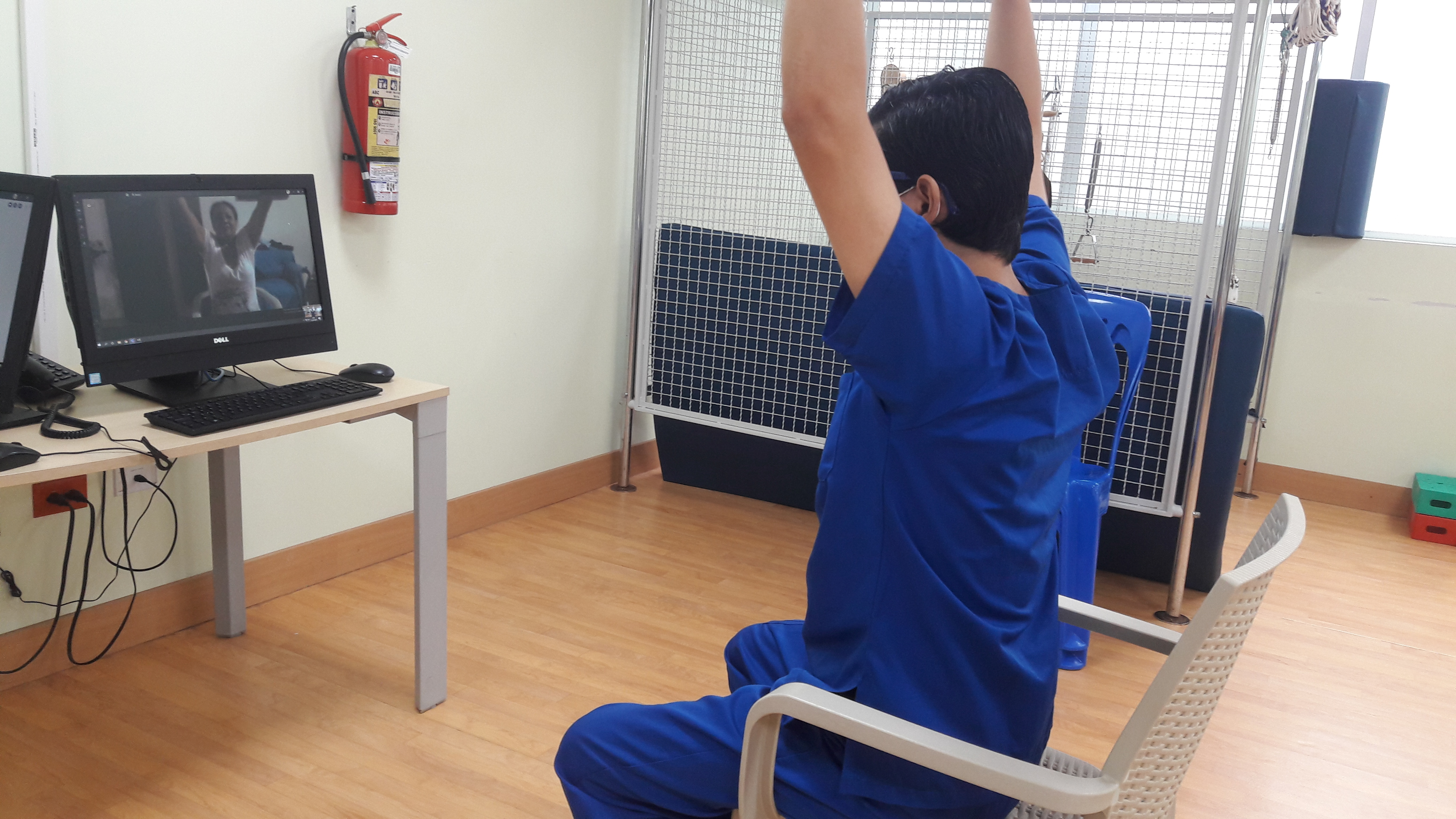 Medical teleconsultation